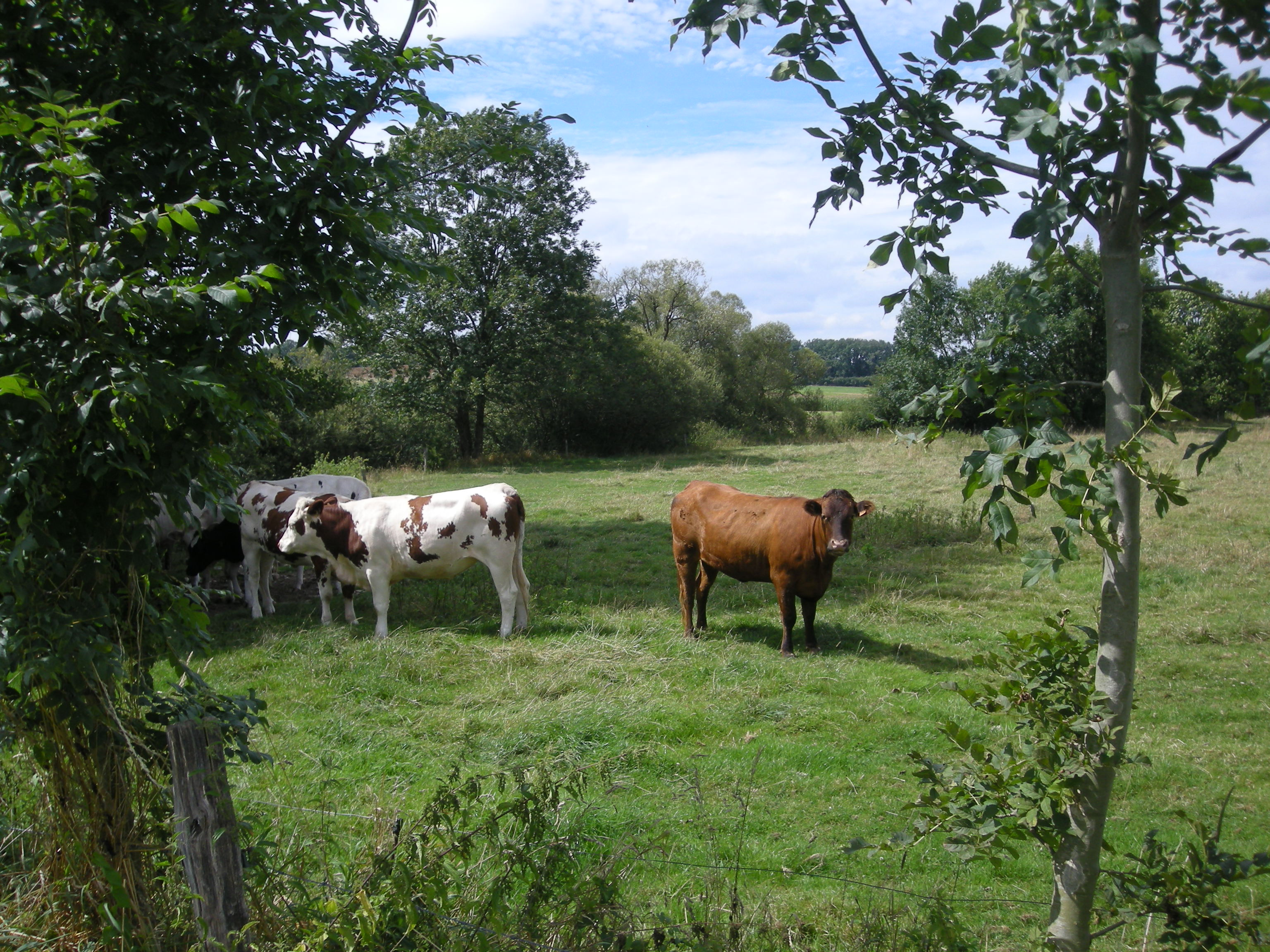 Elevage de bovins à Reherrey (Meurthe-et-Moselle)